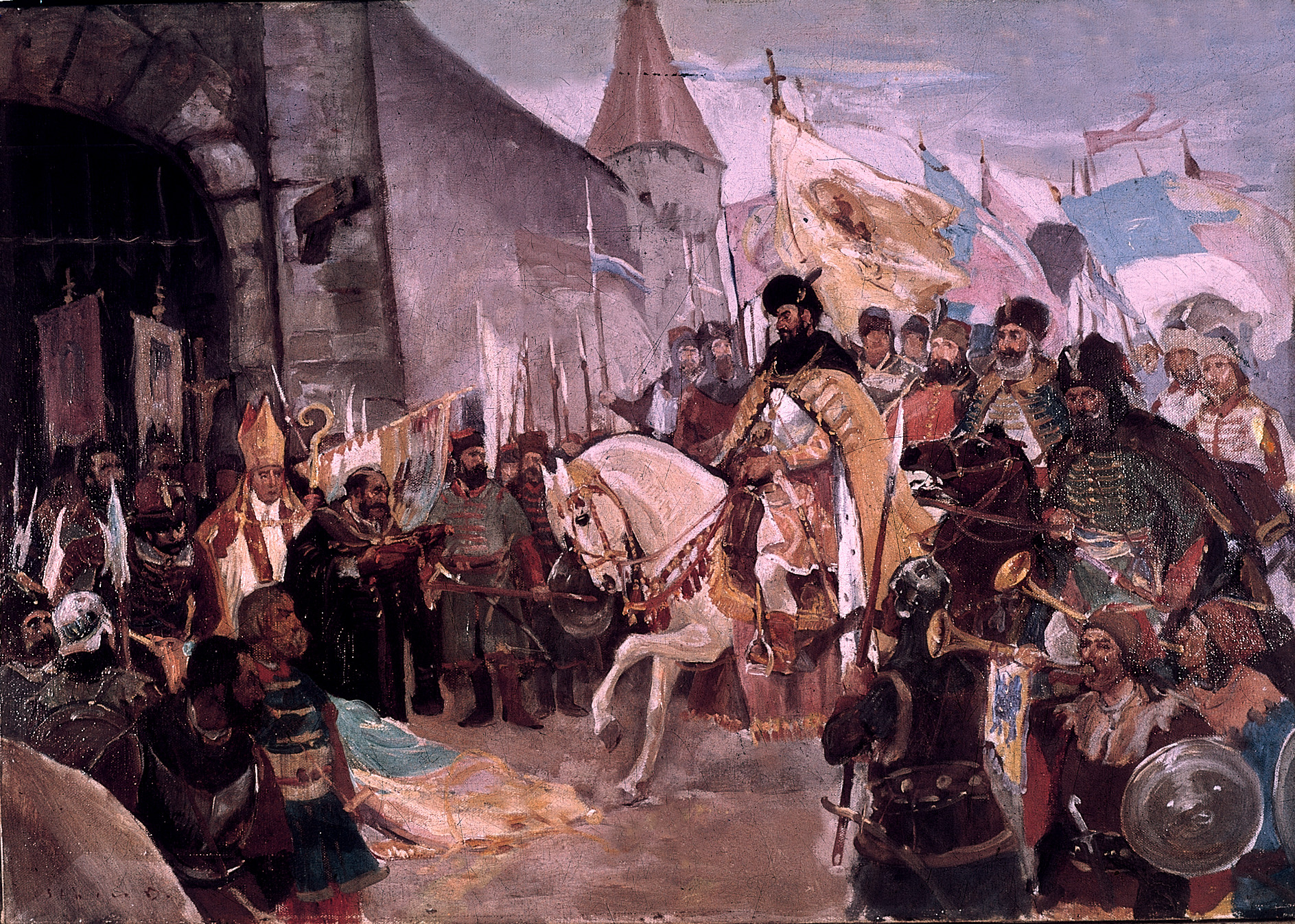 Mihai Viteazul entering Alba Iulia